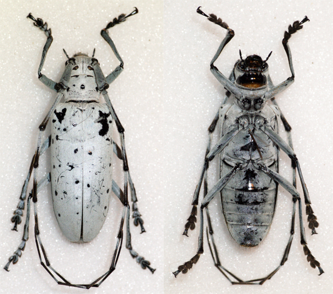 Ritsema,1881 Sex: Female Data: 09-2006 - Mt Dempo - Sumatra Size: ?